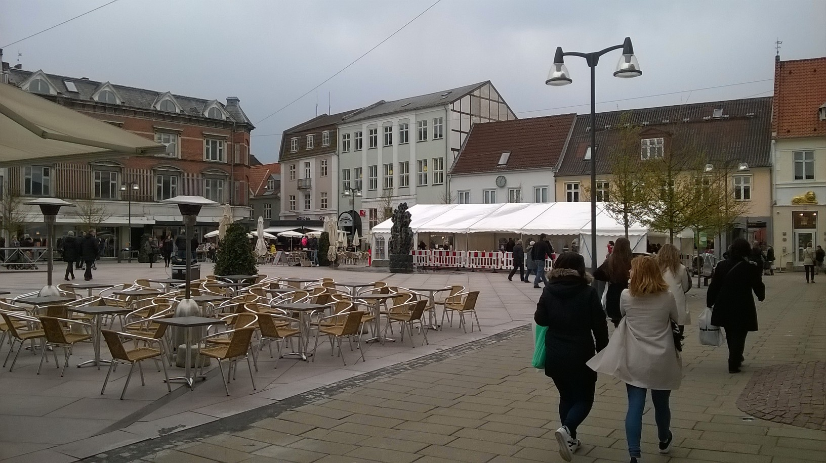 Det centrale torv i Næstved i 2016.